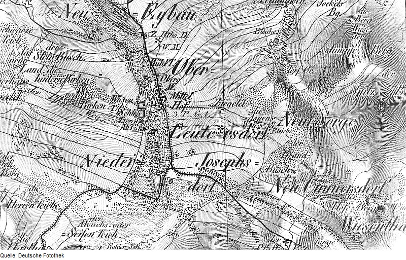 Original image description from the Deutsche Fotothek Leutersdorf. Oberreit, Sect. Zittau, 1844/46